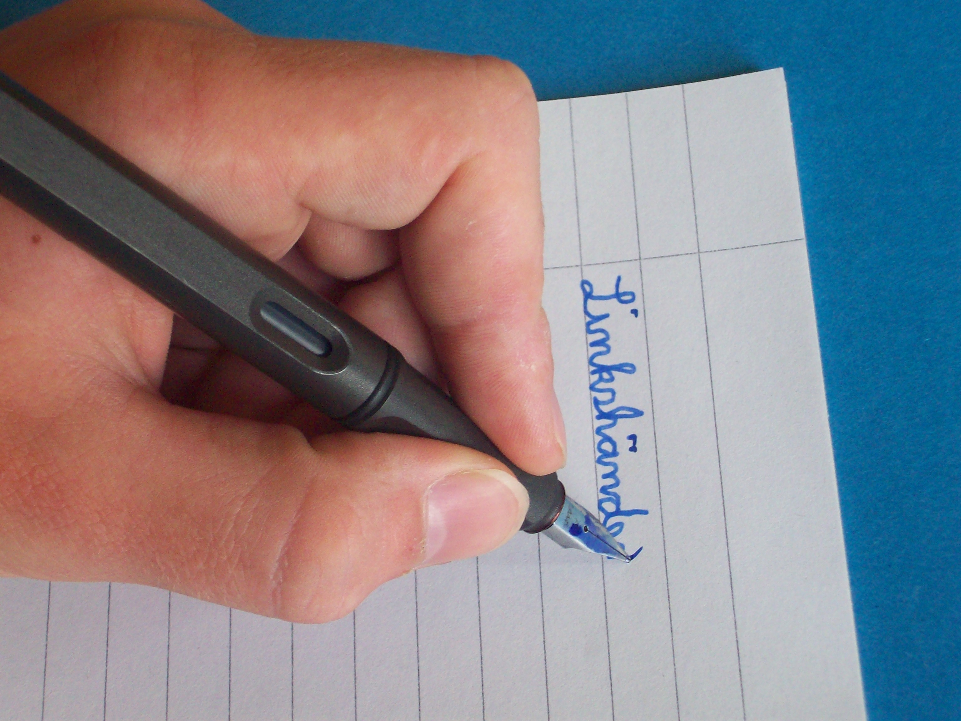 Besipiel für eine unverkrampfte Stifthaltung bei Linkshändern